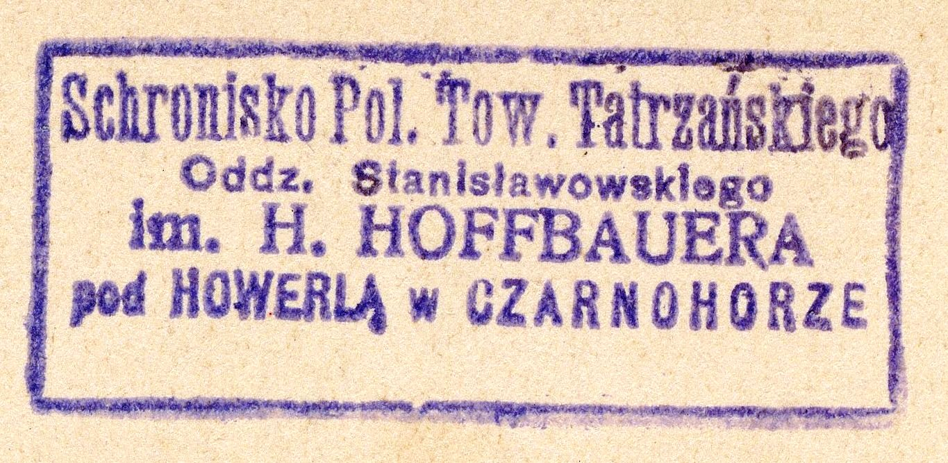 Treść pieczątki: "Schronisko Pol. Tow. Tatrzańskiego Oddz. Stanisławowskiego im. H. HOFFBAUERA pod HOWERLĄ w CZARNOHORZE" umieszczona na pocztówce (bez obiegu) przedstawiającej: "Czarnohora. Howerla 2058 m.n.p. m. z Dancerza". Brak wydawcy. Pocztówka znajduje się w zbiorze prywatnym Roberta Pieńkowskiego z Wrocławia (Wrocławski Bibliofil)